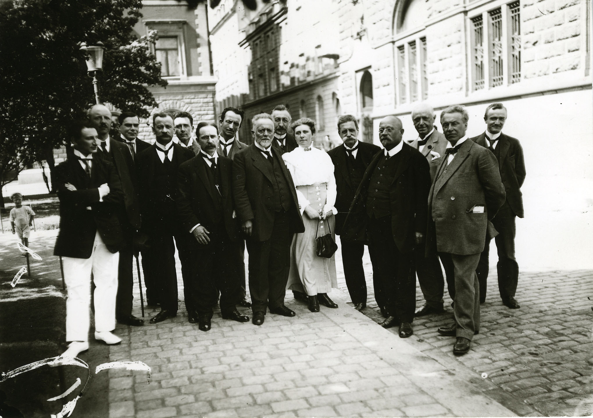 фото из архива семьи